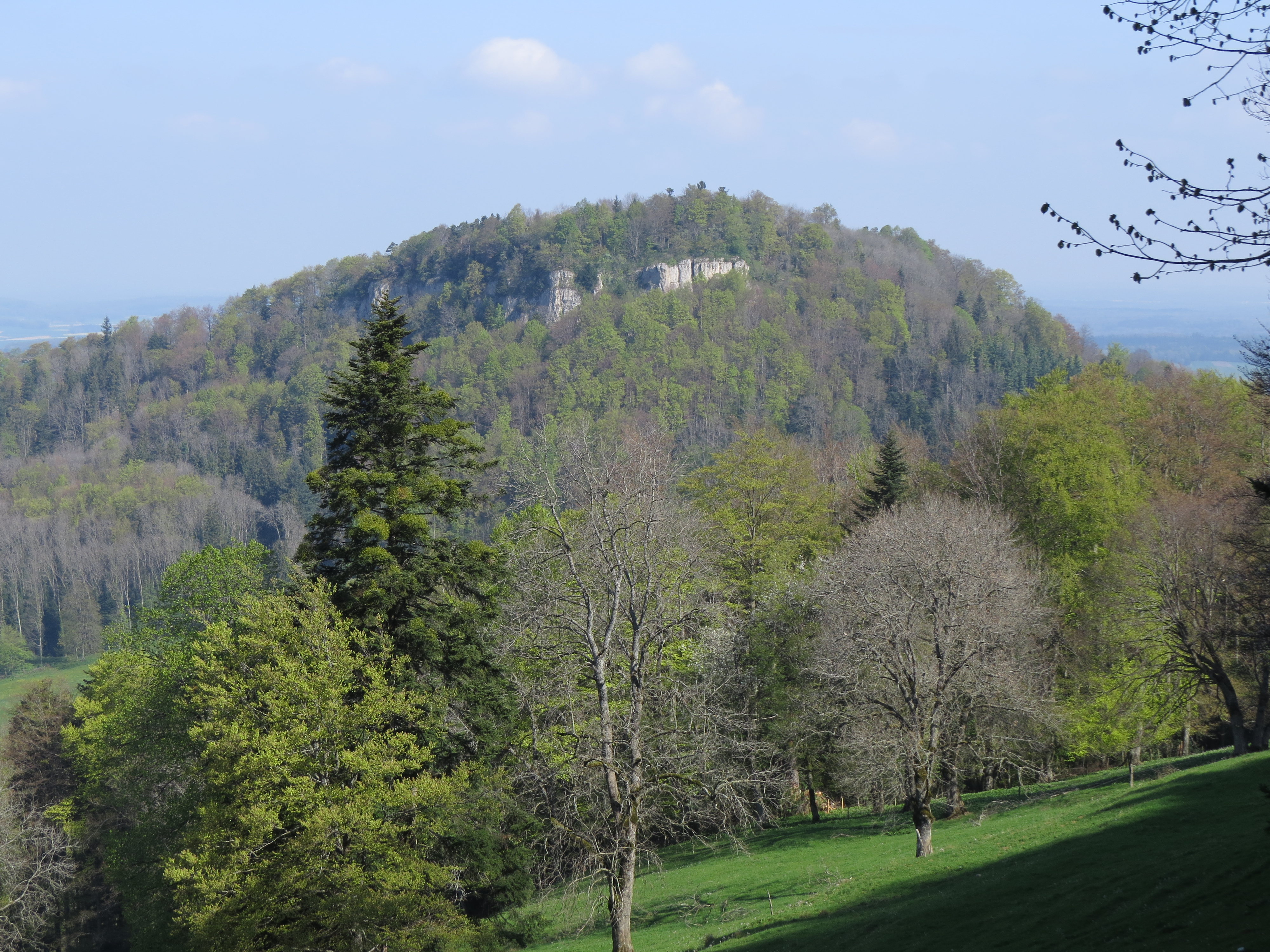 Mont Terri (Jura, Suisse)